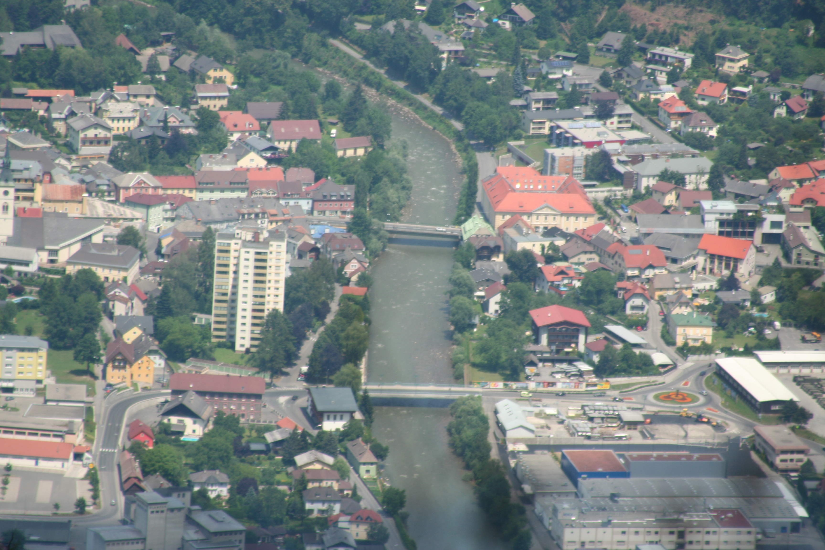 Spittal vom Goldeck aus gesehen